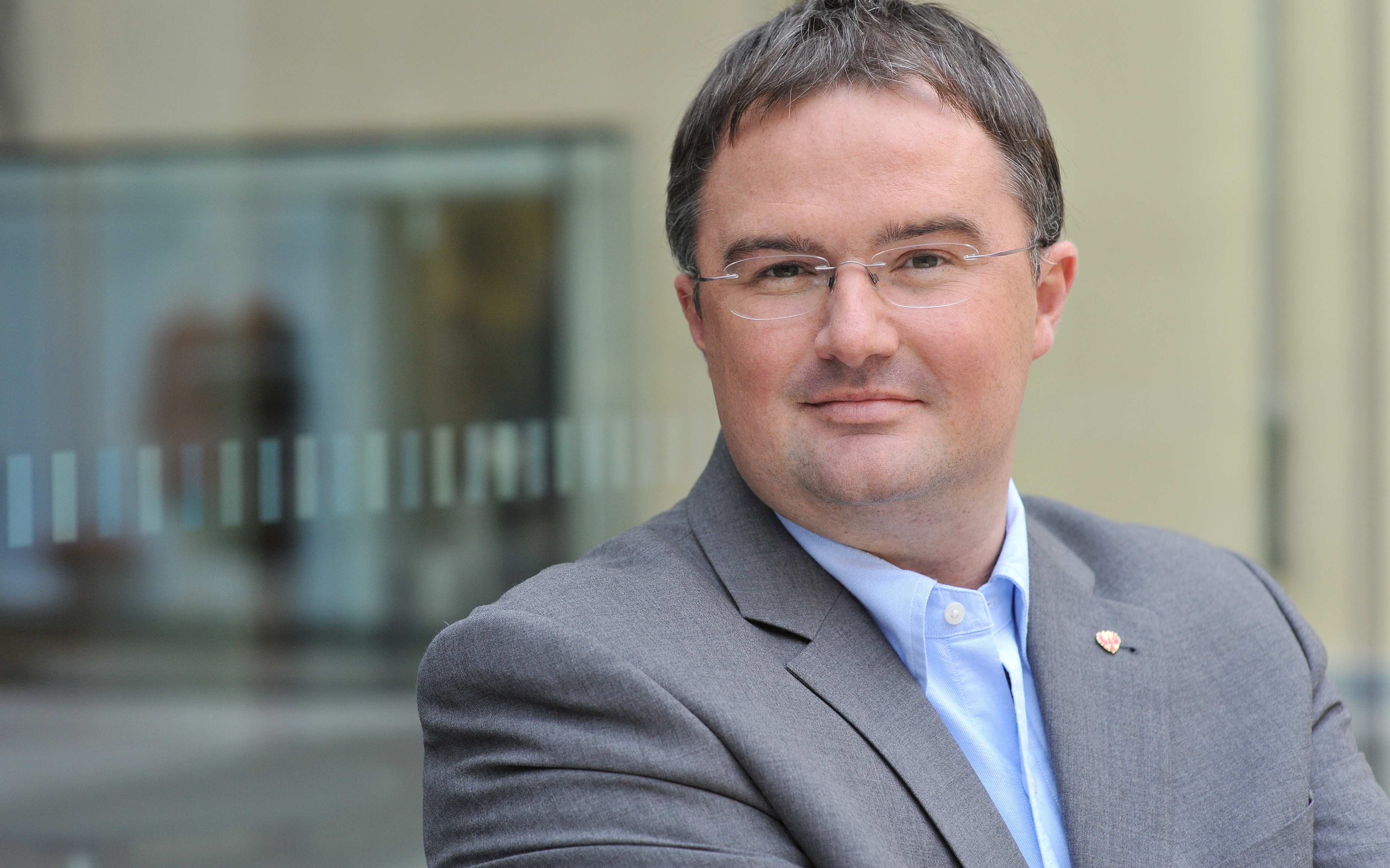 Landesrat Christian Switak